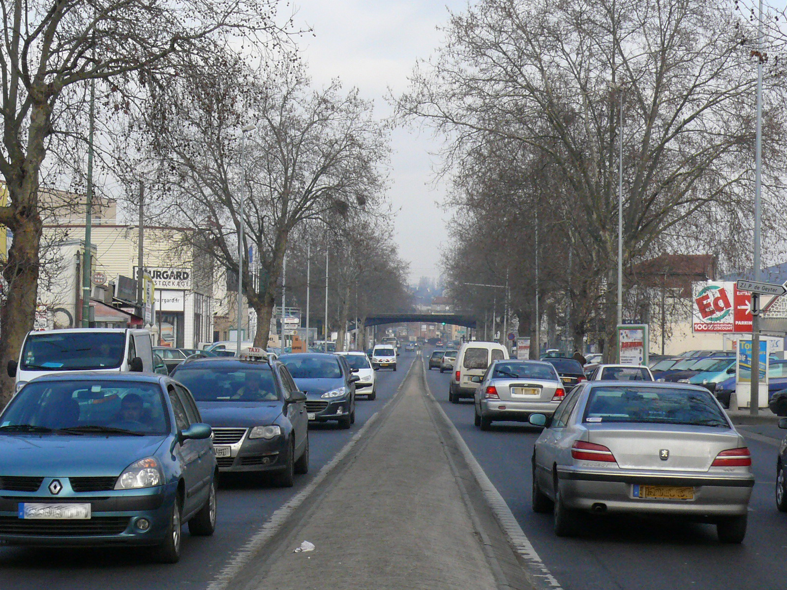 PIERREFITTE : la RN1 et ses 55.000 véhicules/jeurs, sera réaménagée vers 2010 pour y faire passer le Tramway Saint-Denis - Garges-SarcellesOn distingue au second plan le Pont de la Grande Ceinture, qui sera remplacé et doublé dans le cadre de ce projet de tramway ainsi que celui de la Tangentielle Nord.